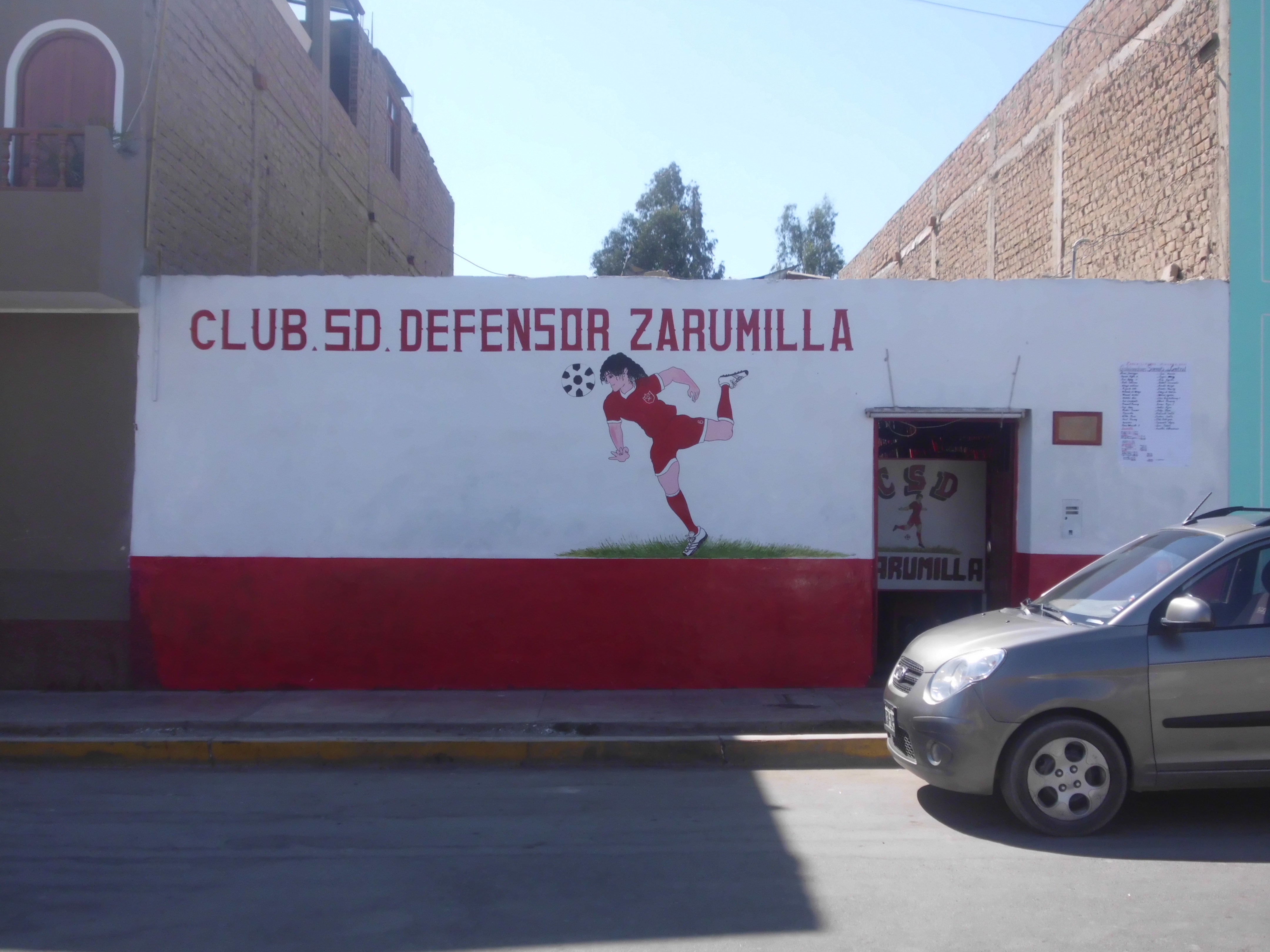 Local del Club Social Deportivo Defensor Zarumilla de Nasca, ubicado en la Av. San Carlos cerca del estadio municipal de Nasca.